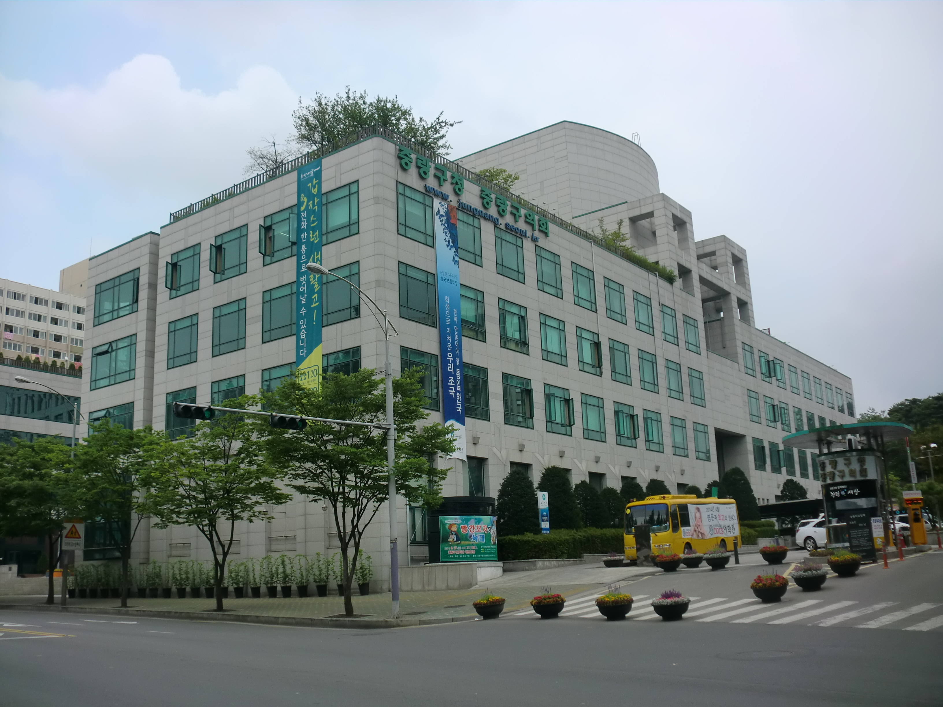 서울특별시 중랑구에 있는 중랑구청